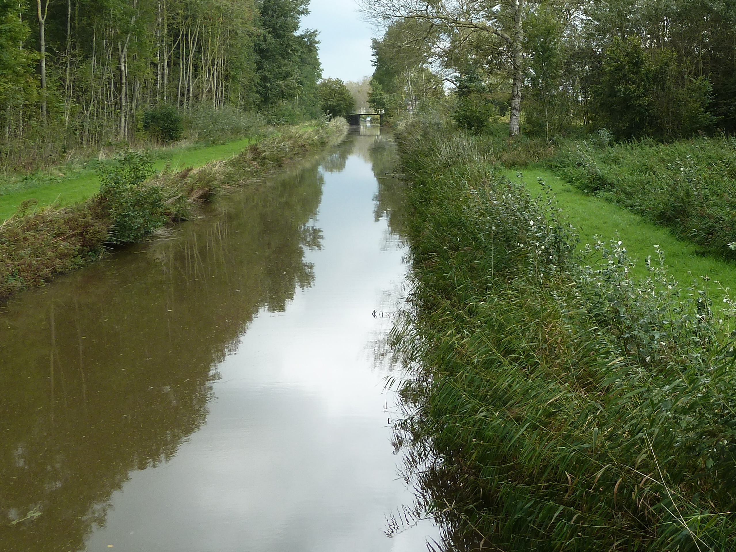 Gezicht vanaf de Peppelvonder over de Houwerzijlsterriet met in de verte een van de Leenstertillen